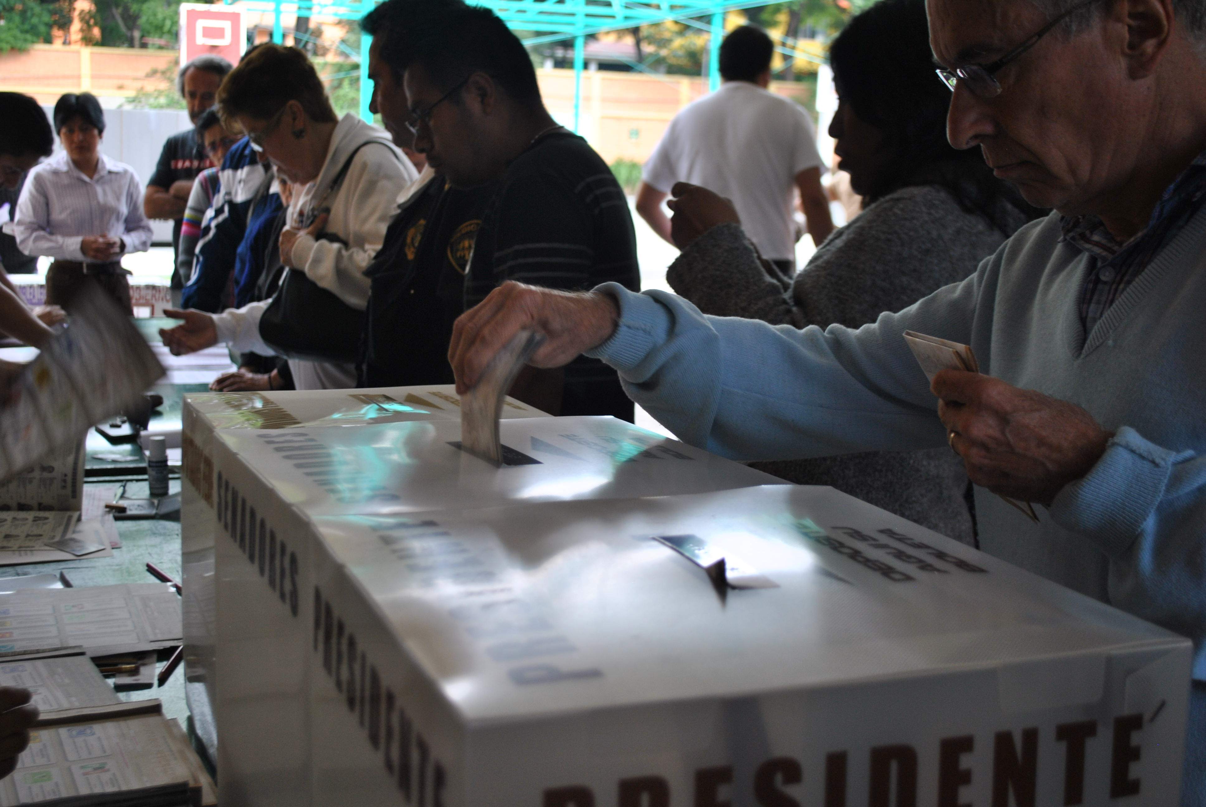 Ciudadano emitiendo su voto en las Elecciones federales en México de 2012. Ciudad de México.